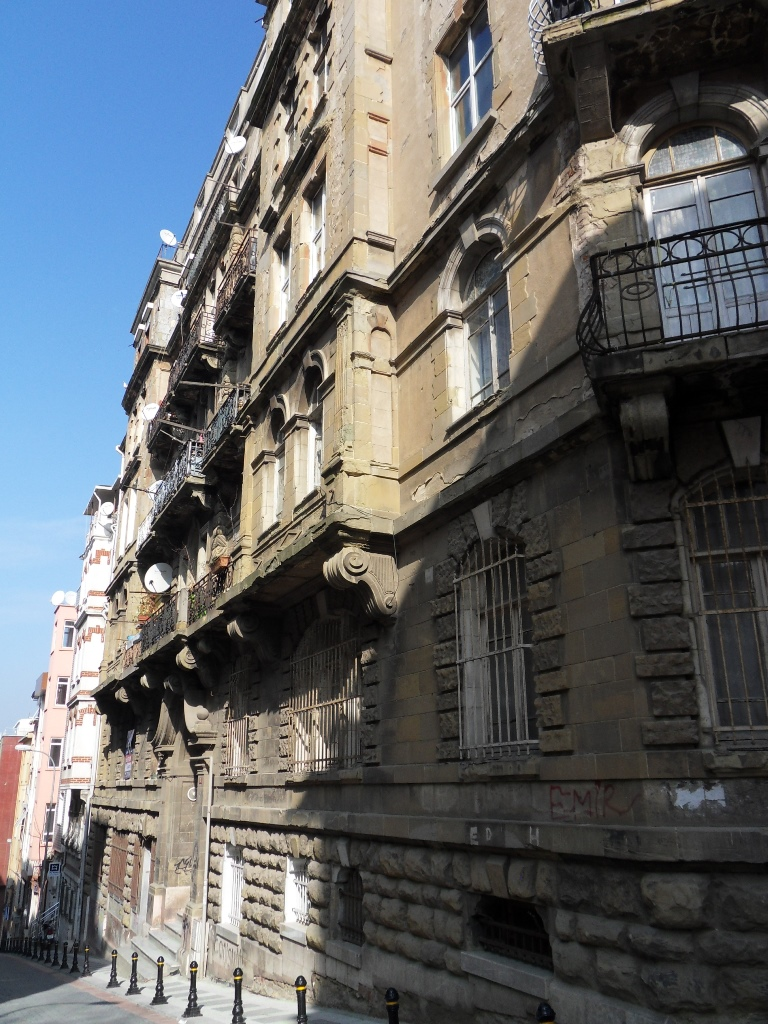 Yeldeğirmeninde bulunan İtalyan Apartmanı.